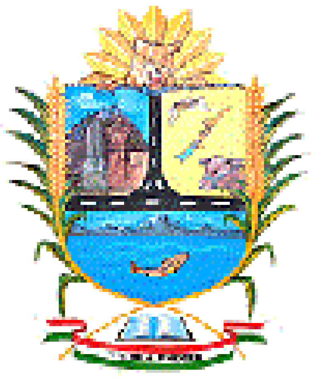 escudo